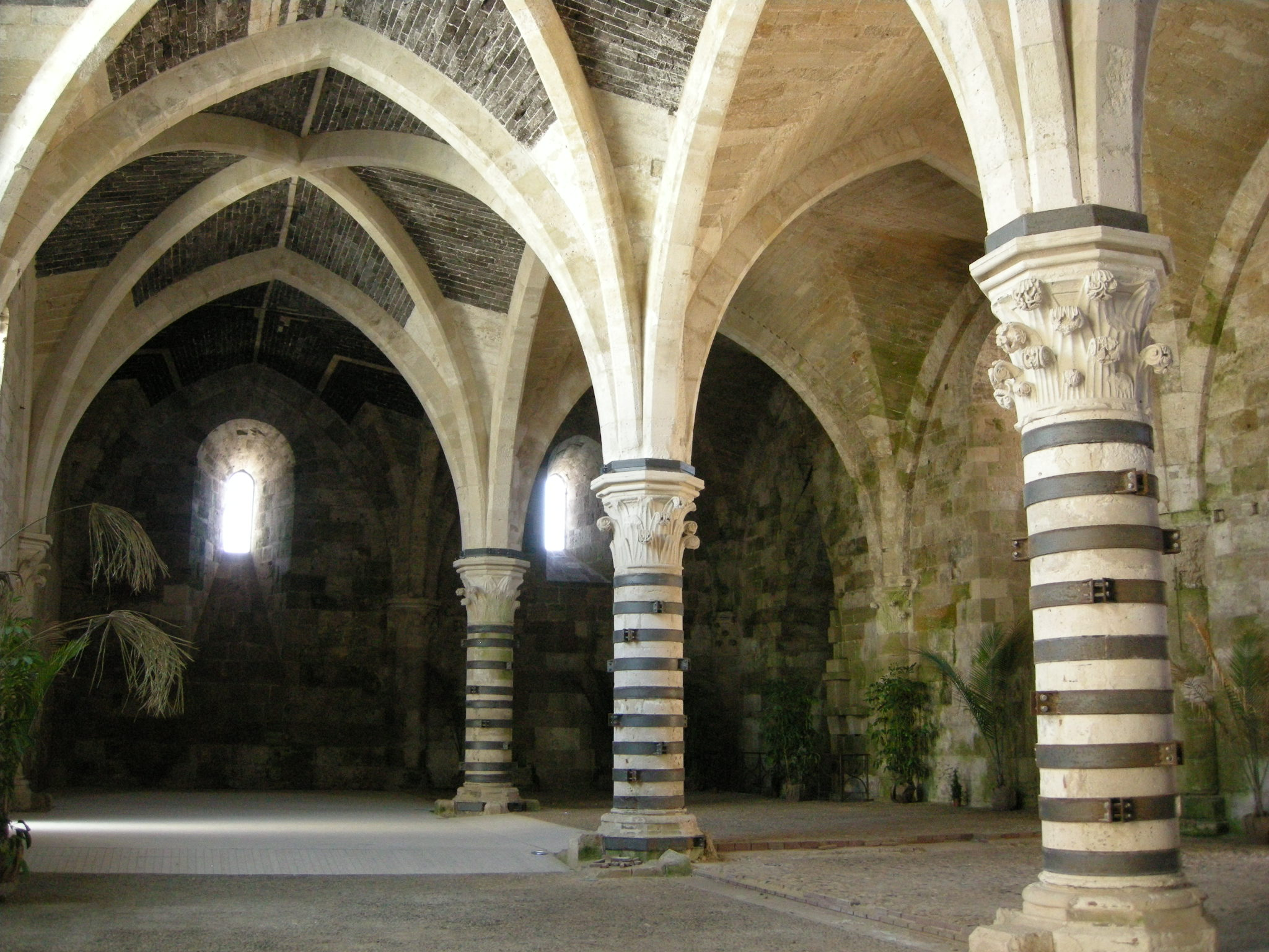 Ortigia, castello maniace, interno, sala